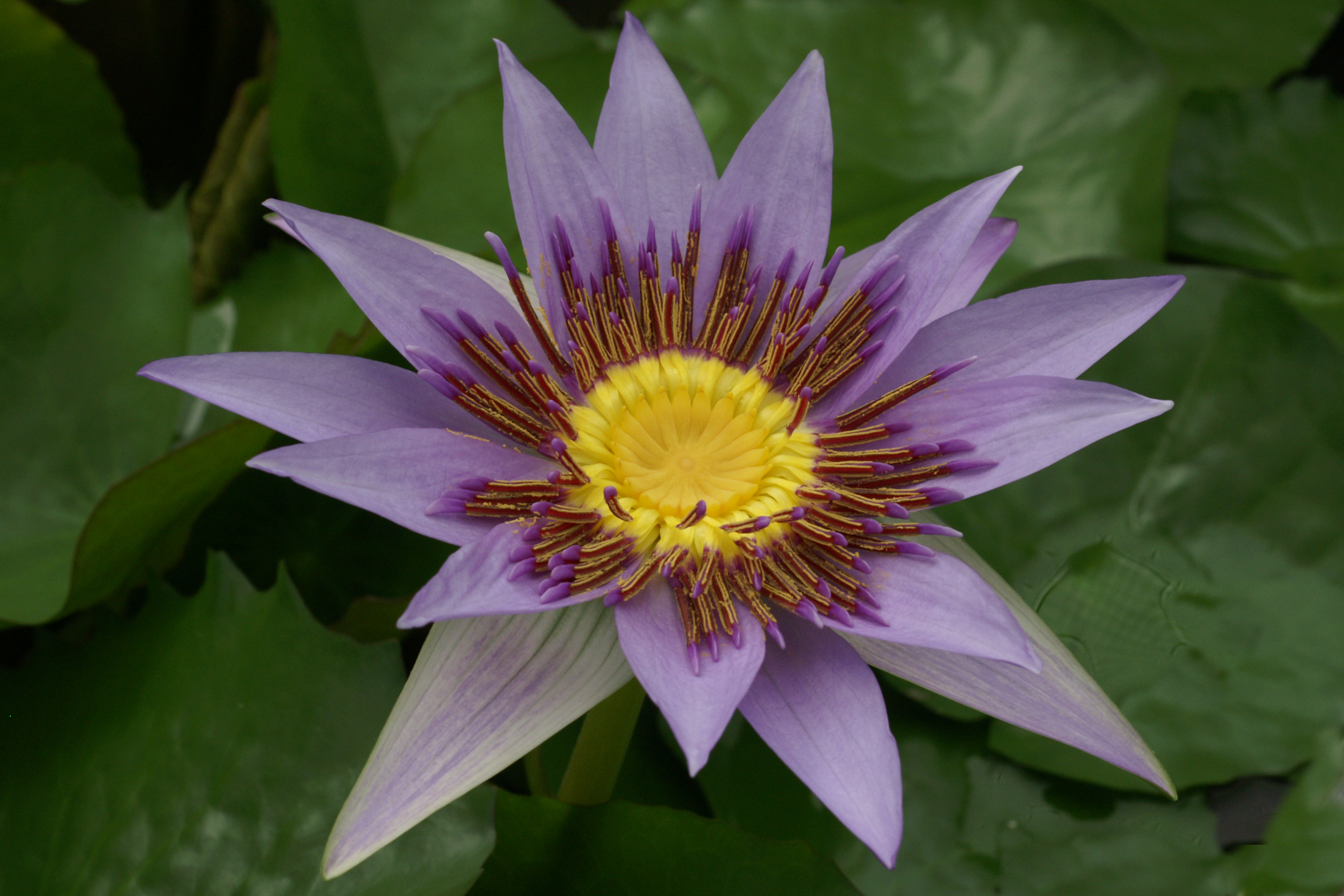 Bunte Seerose (Nymphaea colorata) im Botanischen Garten, Berlin